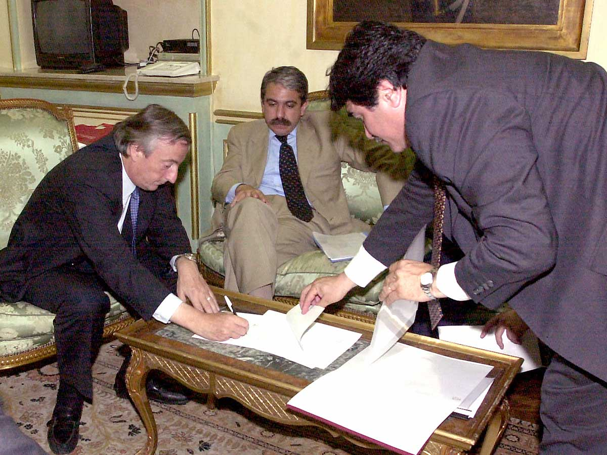 Casa Rosada - El presidente Kirchner firma el Proyecto de Ley de intervención de la provincia de Santiago del Estero.